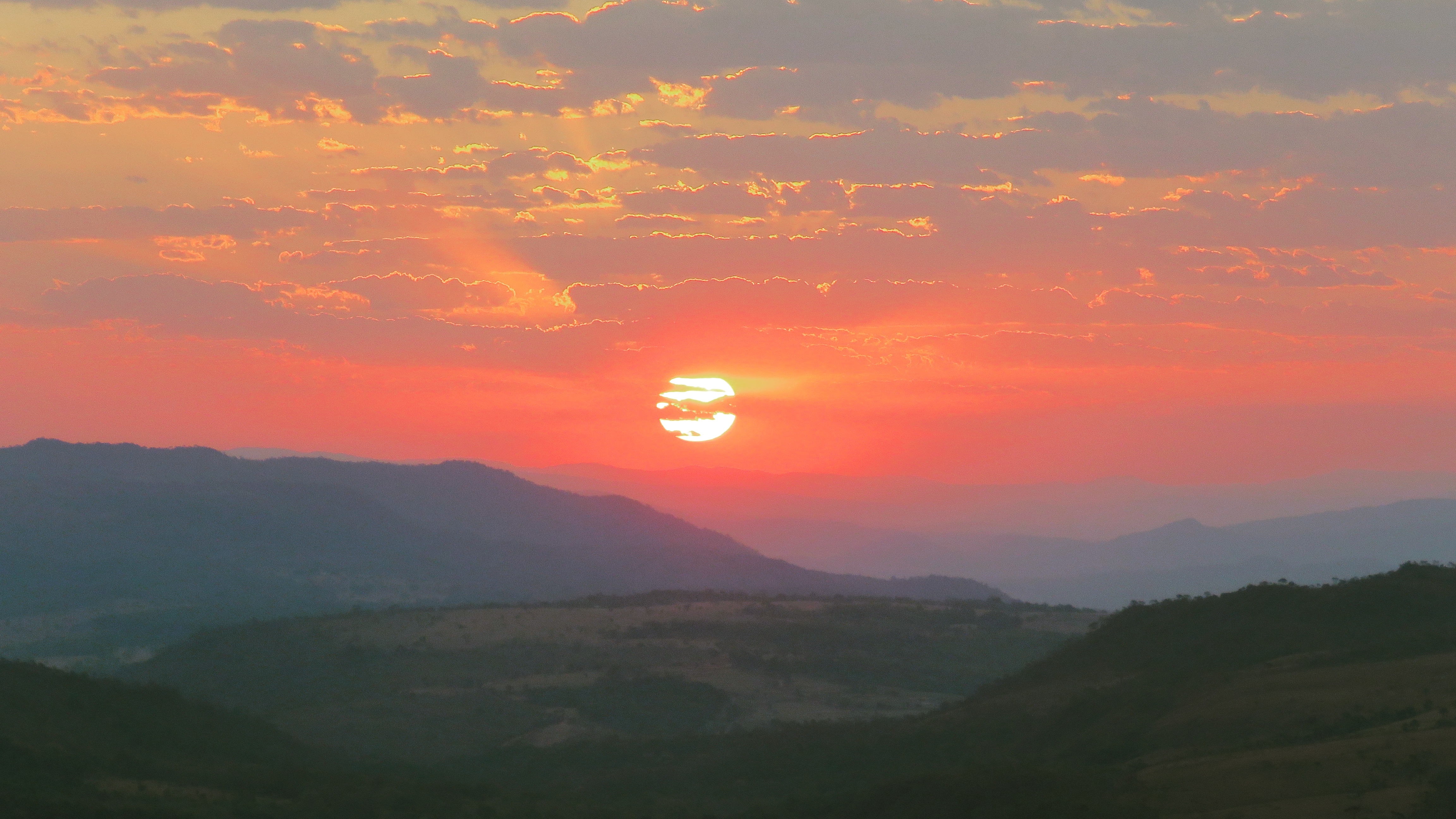 Pôr-do-sol observado do alto do Pico dos Pireneus no Parque Estadual do Pireneus.